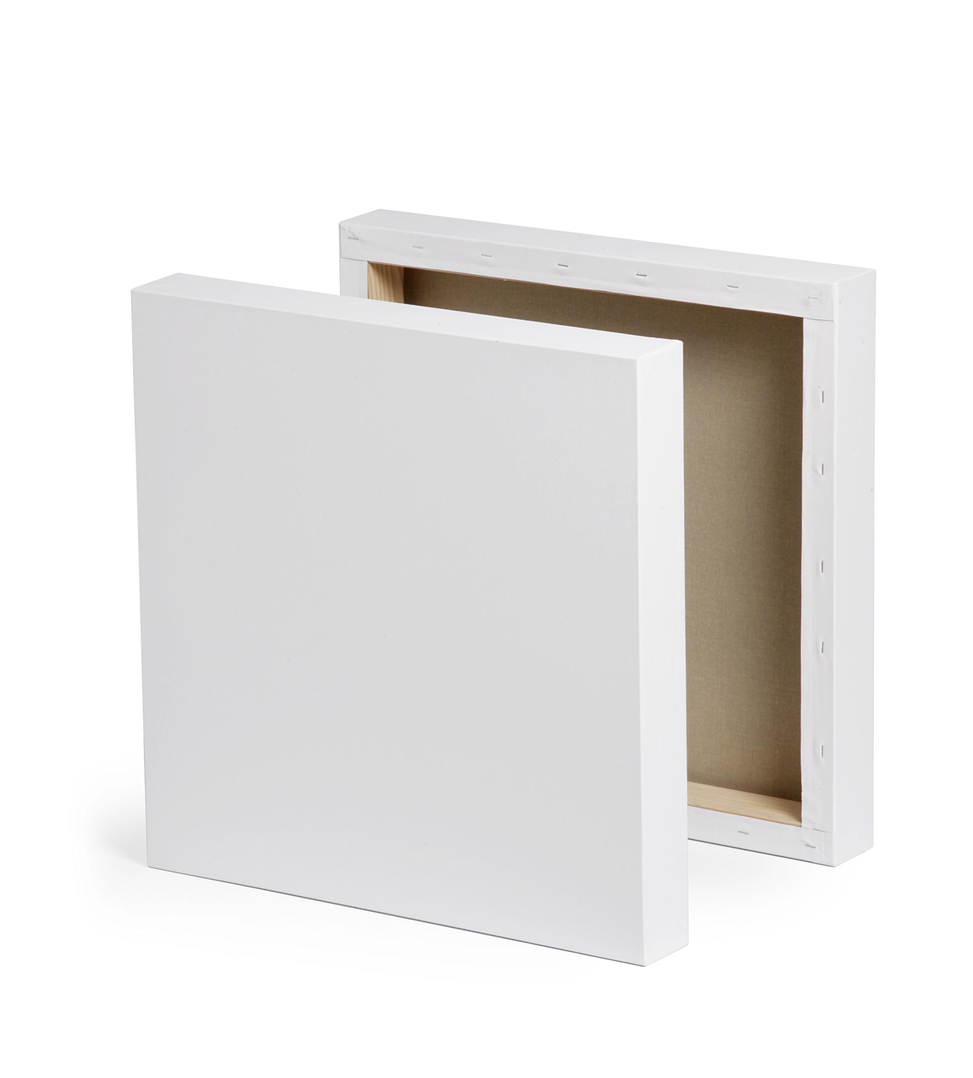 3D Schildersdoek